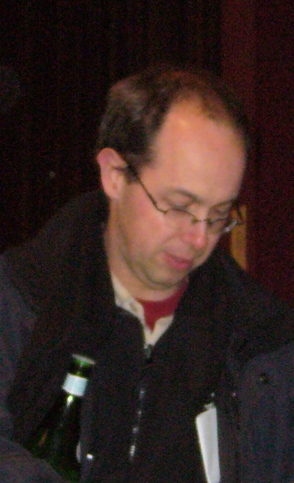 Pierre-Paul Renders au festival Fantastic'Arts